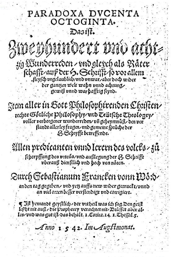 Paradoxa, 2^ edizione di Basilea, 1542 (1^ edizione, Ulm 1534)